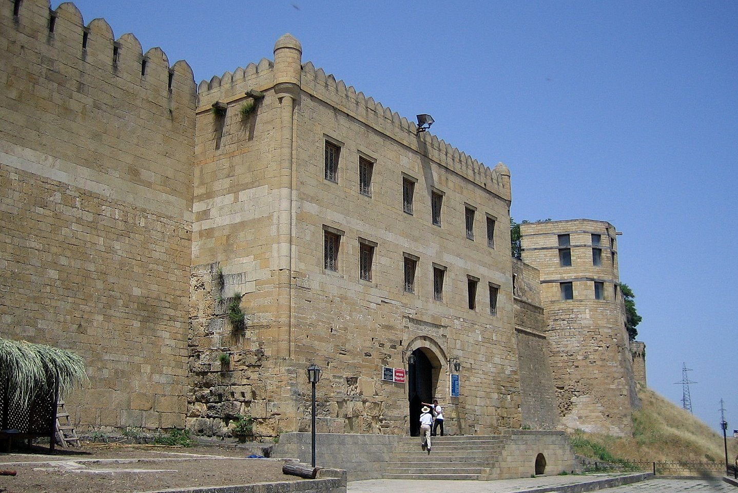 Дербентская цитадель «Нарын-Кала» и древние сооружения внутри цитадели (Республика Дагестан, Дербент, город Дербент)